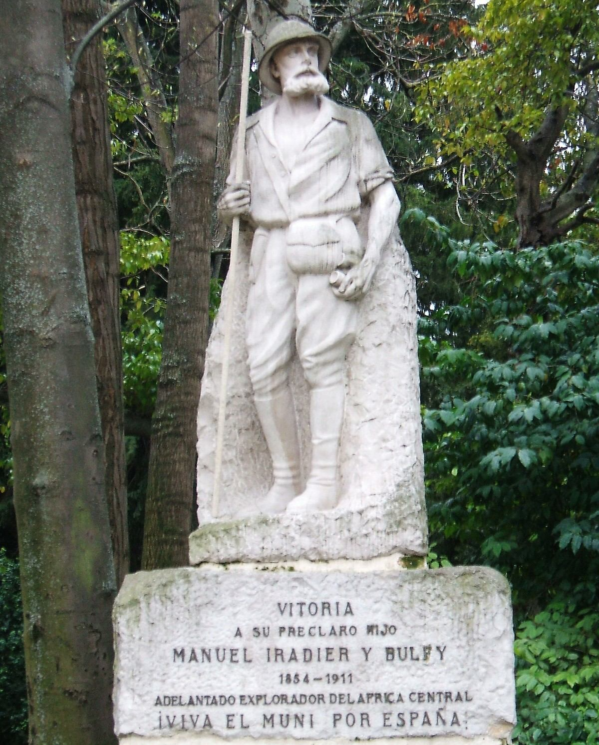 Monumento a Manuel Iradier, parque de la Florida, Vitoria-Gasteiz, España